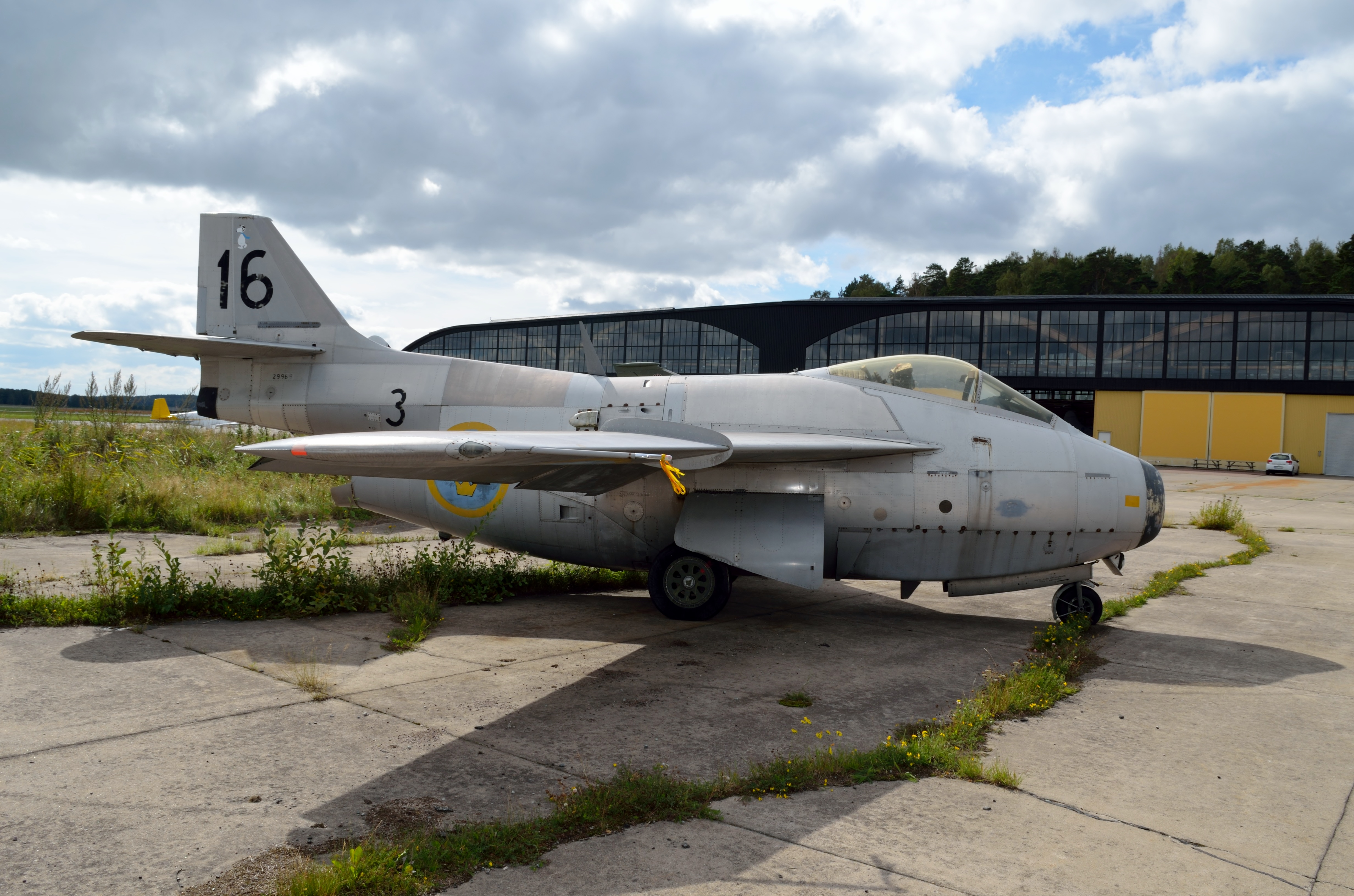 S 29C Tunnan vid Västerås flygmuseum. Individen (29969) levererades till F 11 i Nyköping den 31 december 1955. Överlämnad den 21 augusti 1956 till CVM för modifiering, åter till F 11 den 13 september 1956. Överförd till F 21 i Luleå den 25 juli 1960. Överförd till F 3 i Malmslätt den 1 december 1967. Kasserades den 21 april 1970, och överfördes till Johannisbergsskolan, Västerås.